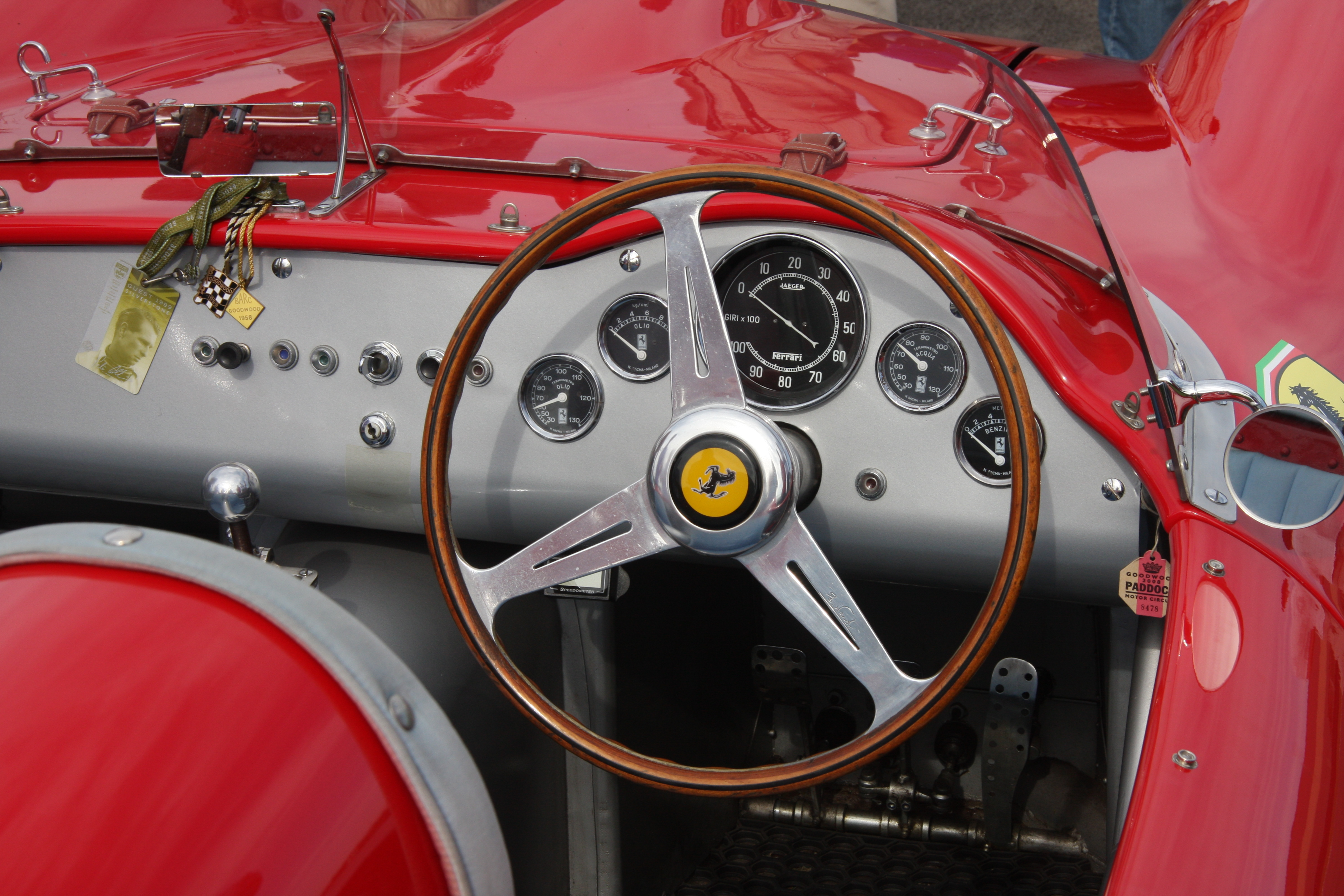 Ferrari 196S